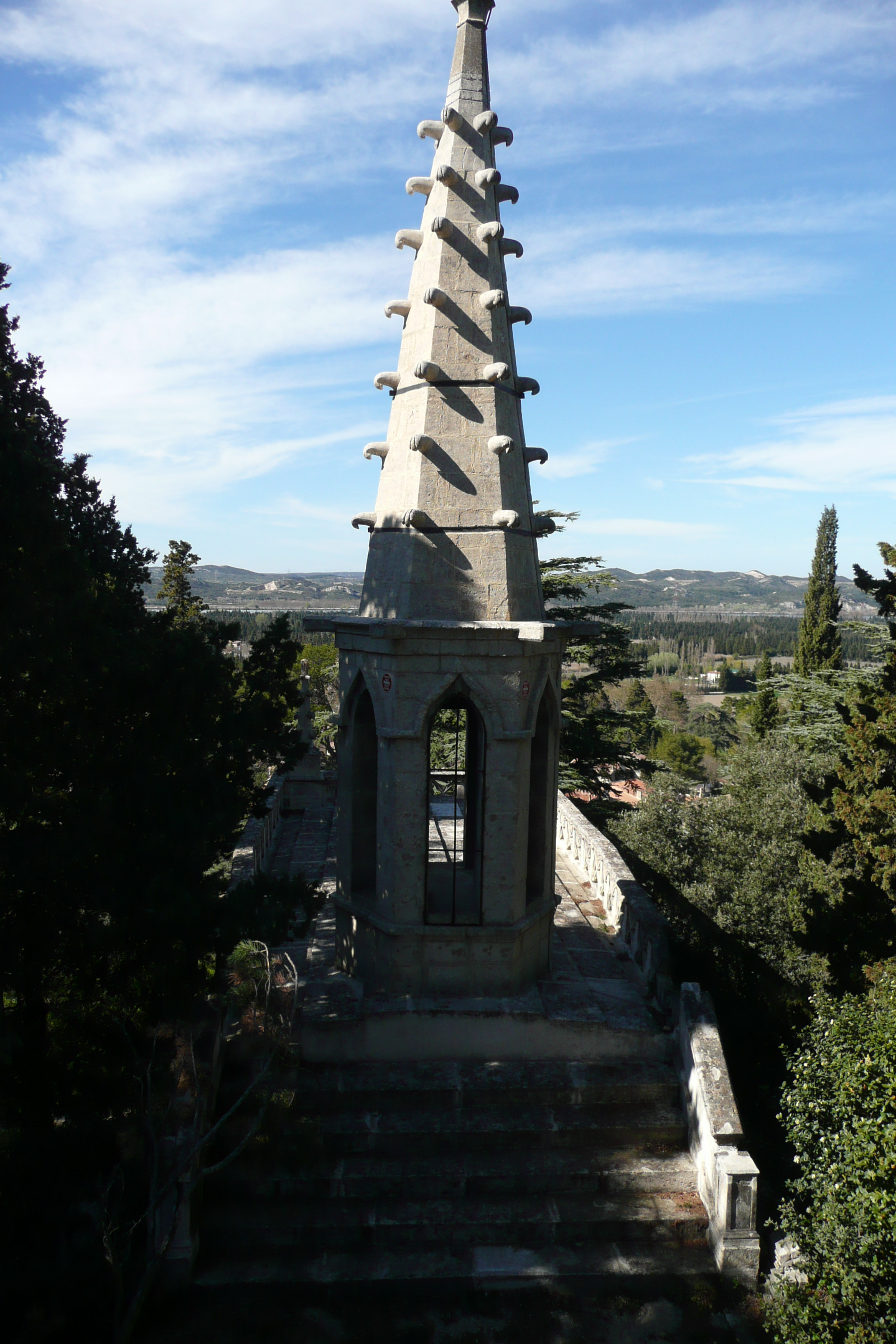 Barbentane